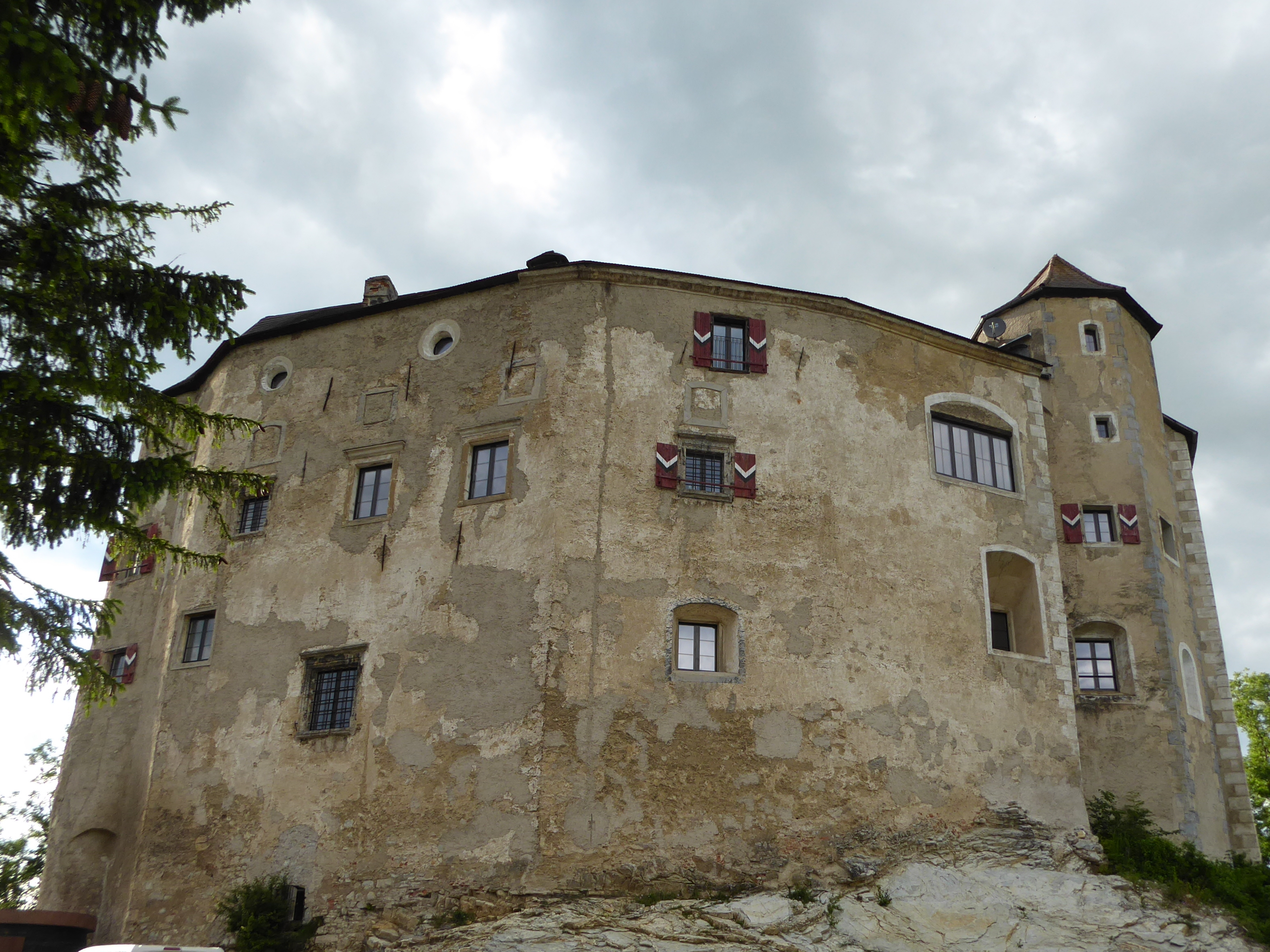 Schloss Plankenstein, Plankenstein 1, Texingtal, Niederösterreich - Südseite